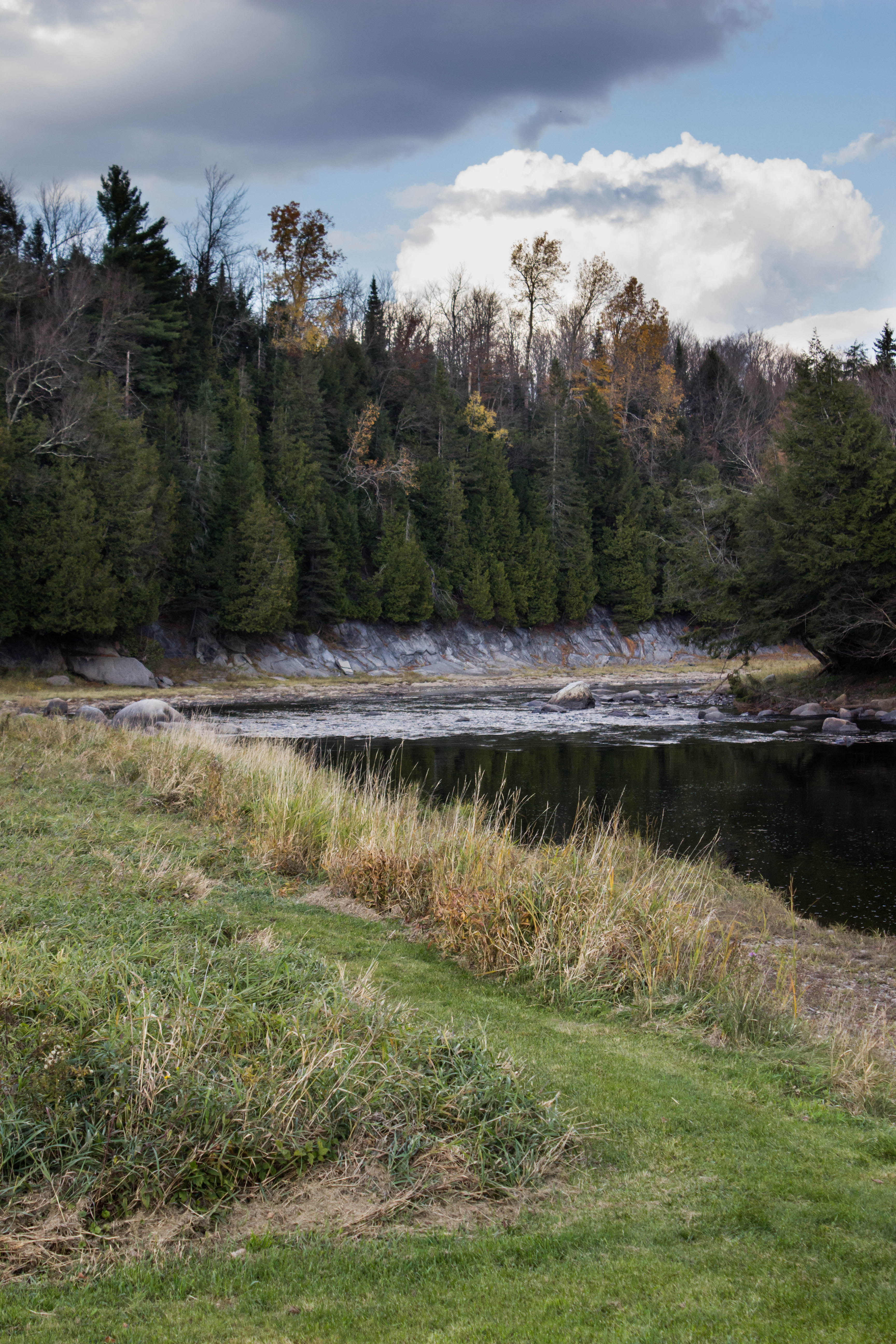 Pont McVetty-McKenzie à Lingwick (Québec), vue sur la rivière au Saumon.